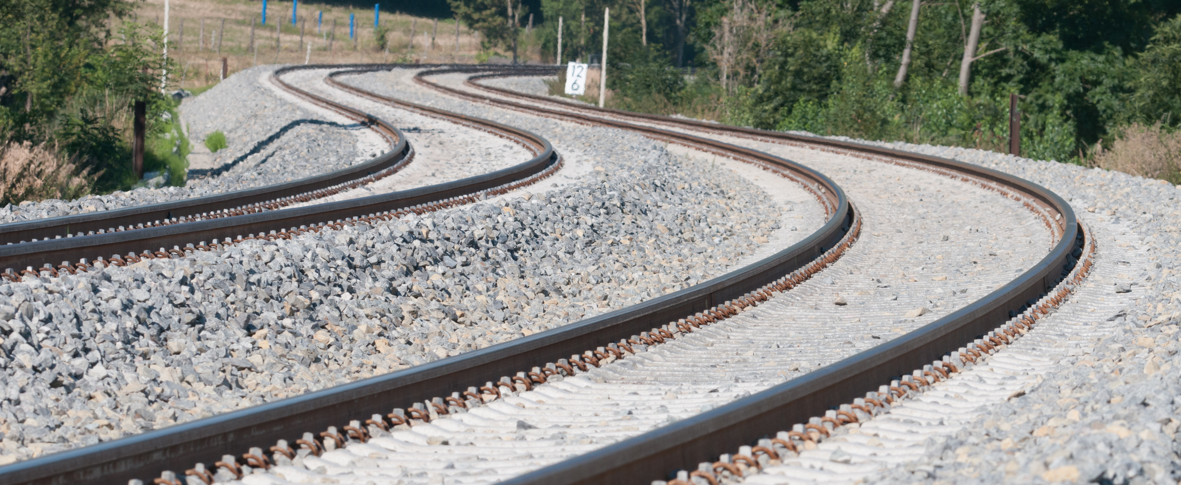 Gemeinde Mellingen in Thüringen